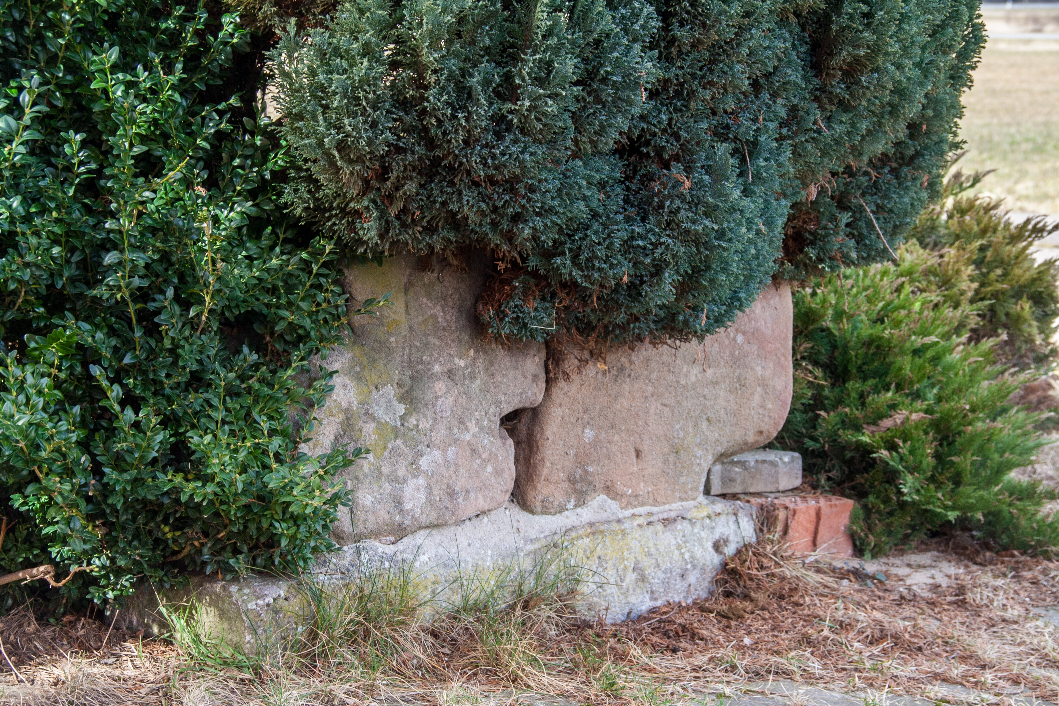 Sühnekreuz, Schwaighausen